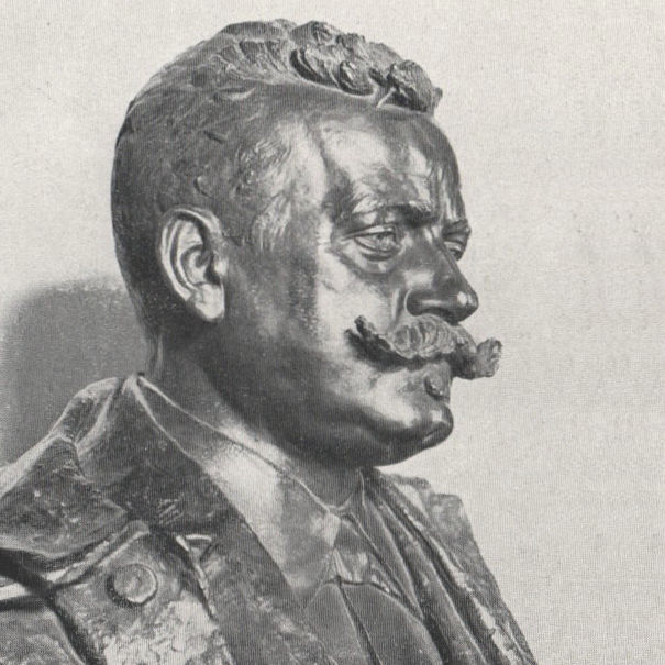 Ladislav Rott (1850-1906) v roce 1897, busta Bohumila Vlčka (výřez fotografie)